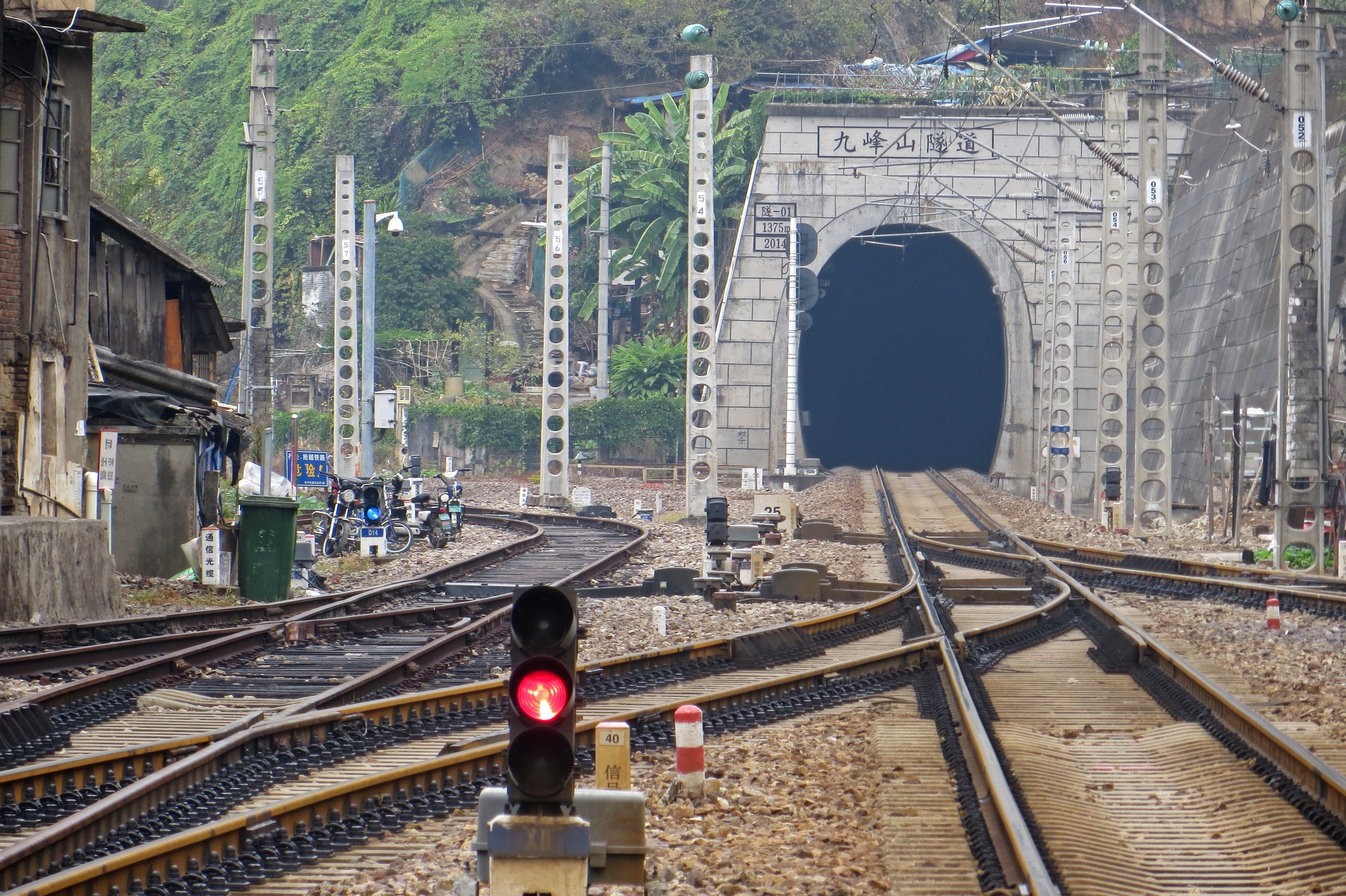 中文（中国大陆）: 水南站，原南平站。